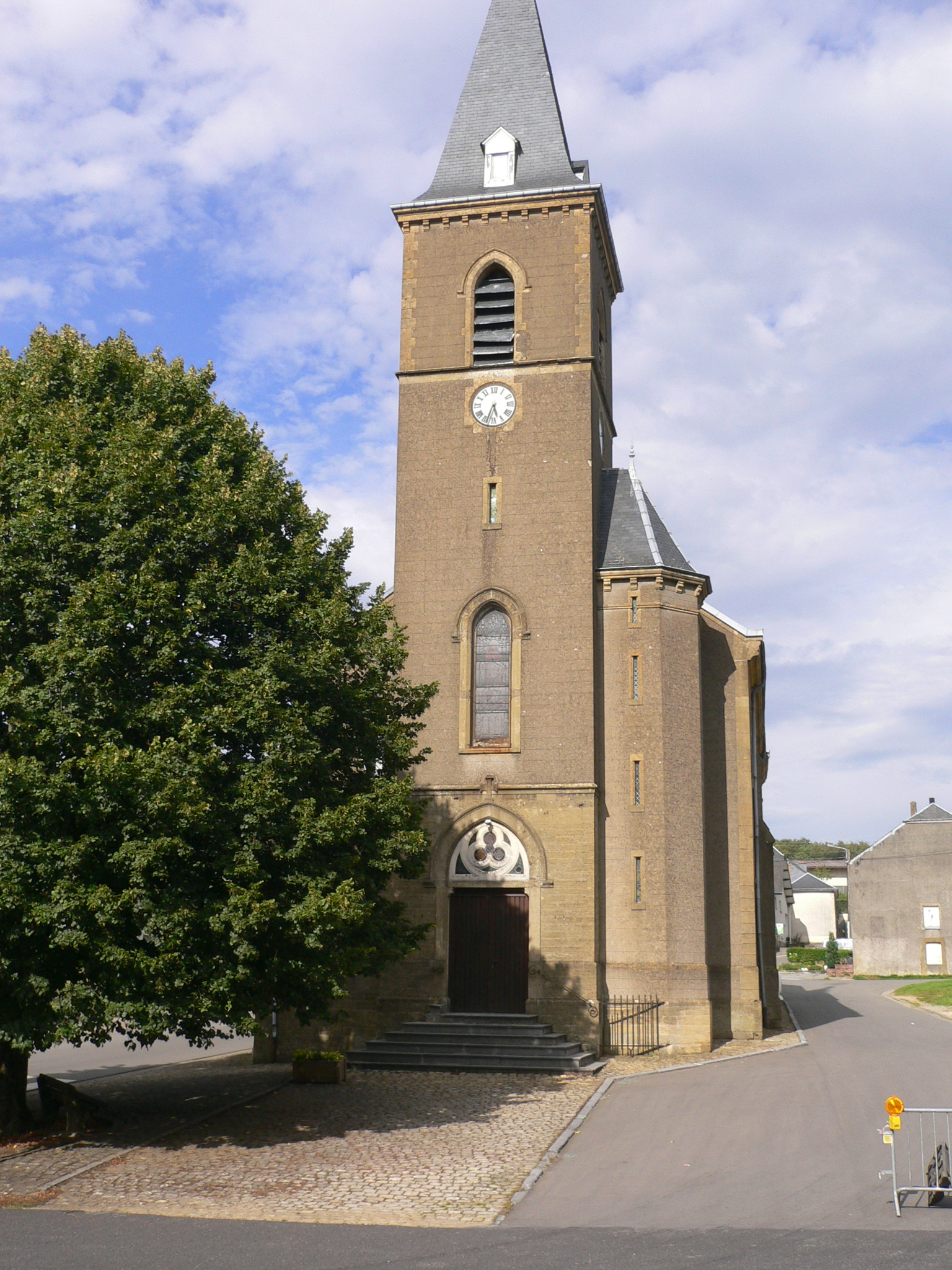 L'église Saint-Roch de Saint-Vincent (Tintigny, Belgique)